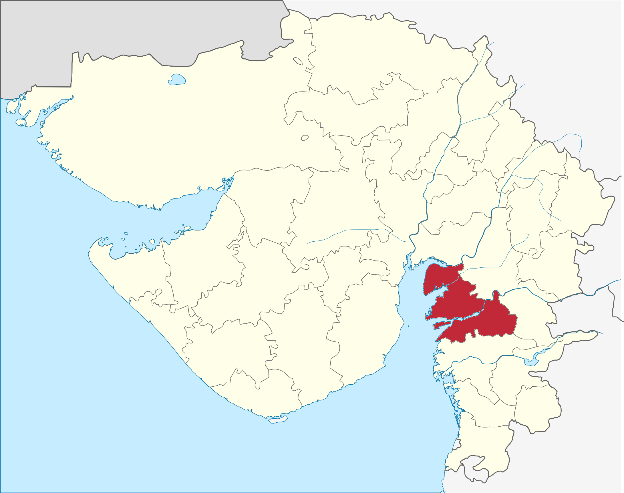 Distrito de Bharuch en Gujarat